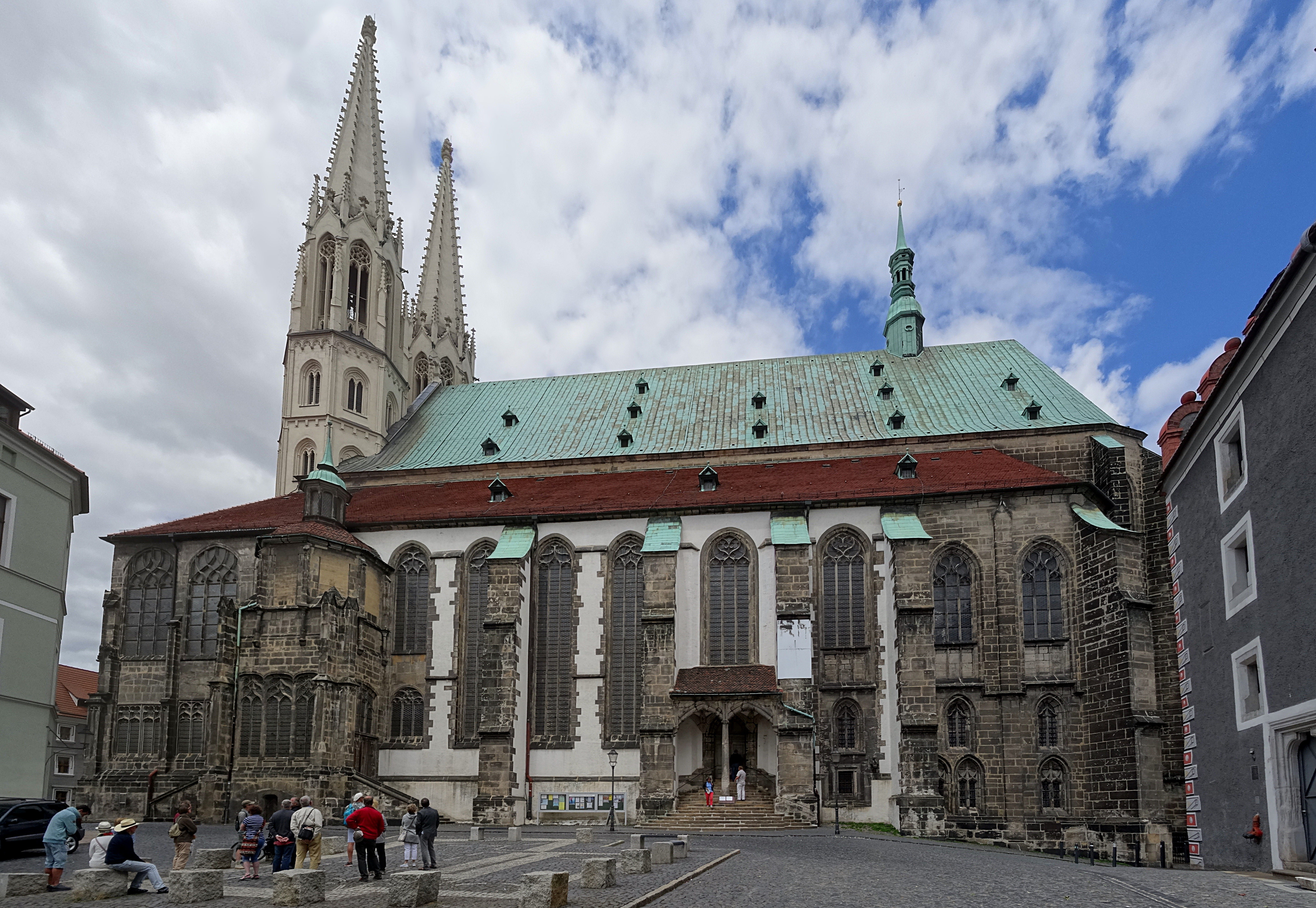 Stadtkirche St. Peter und Paul (Görlitz), Ansicht von Süden